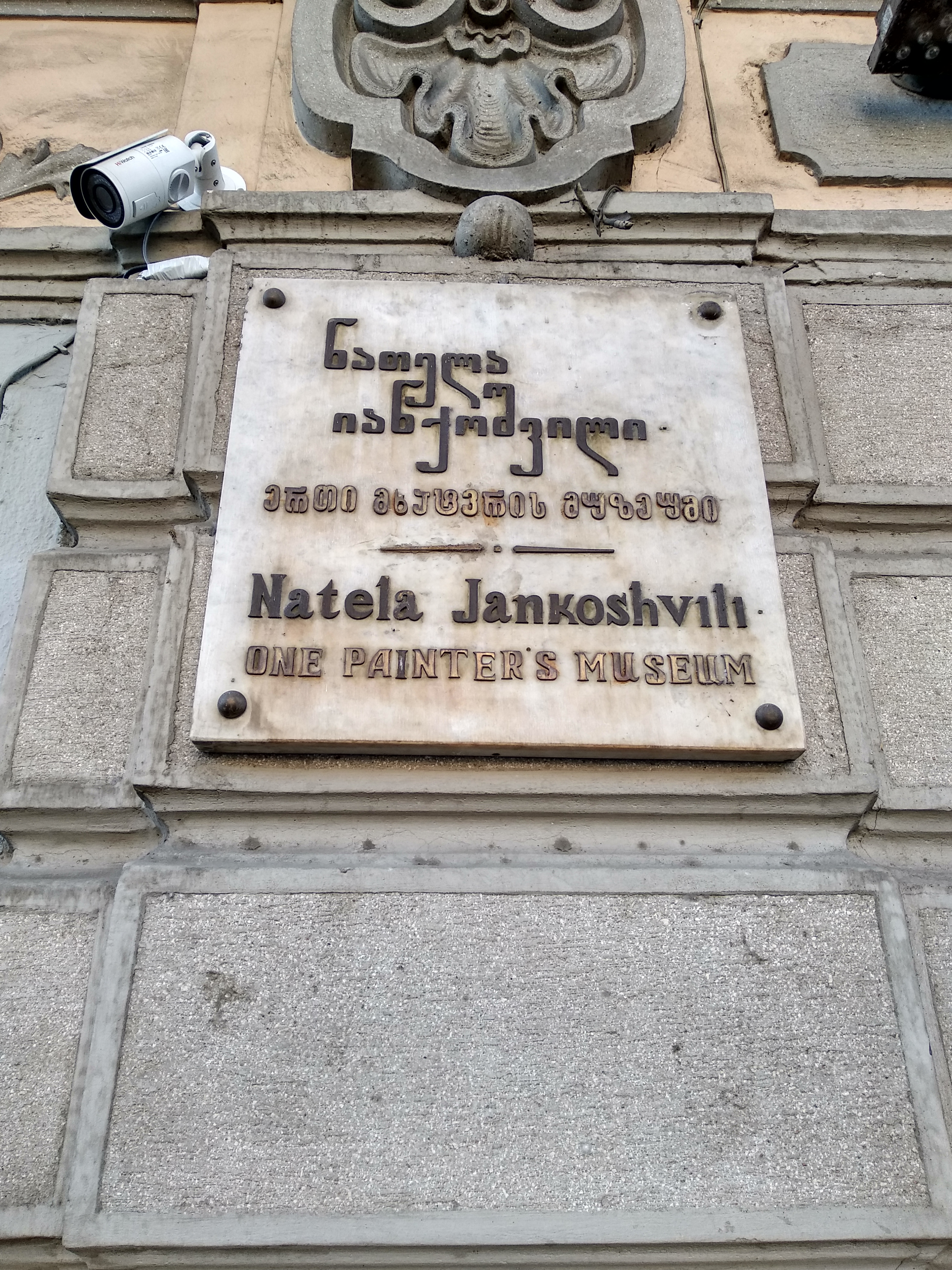 ნათელა იანქოშვილის მემორიალური დაფა თბილისში